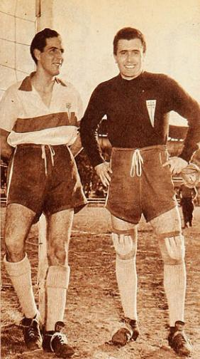 Jugadores Jorge Luco y Krebs en 1958